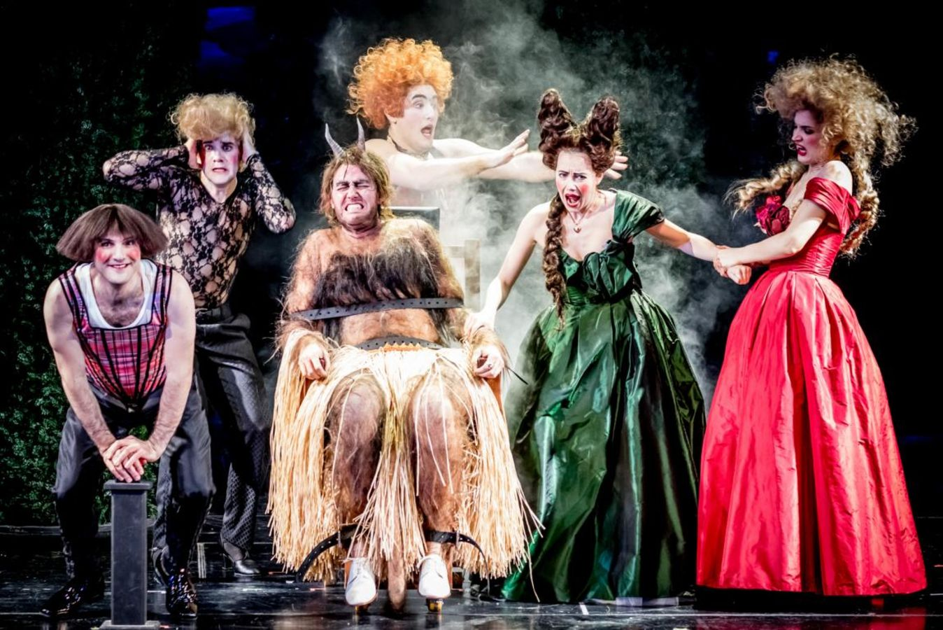 1ère représentation de Damon de Telemann au Théâtre de Magdeburg (Festival Telemann 2016)